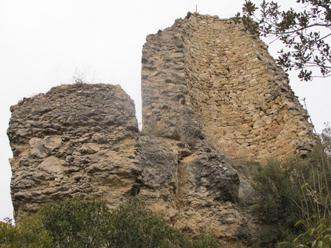 Castell de Calders a la comarca del Bages - Catalunya